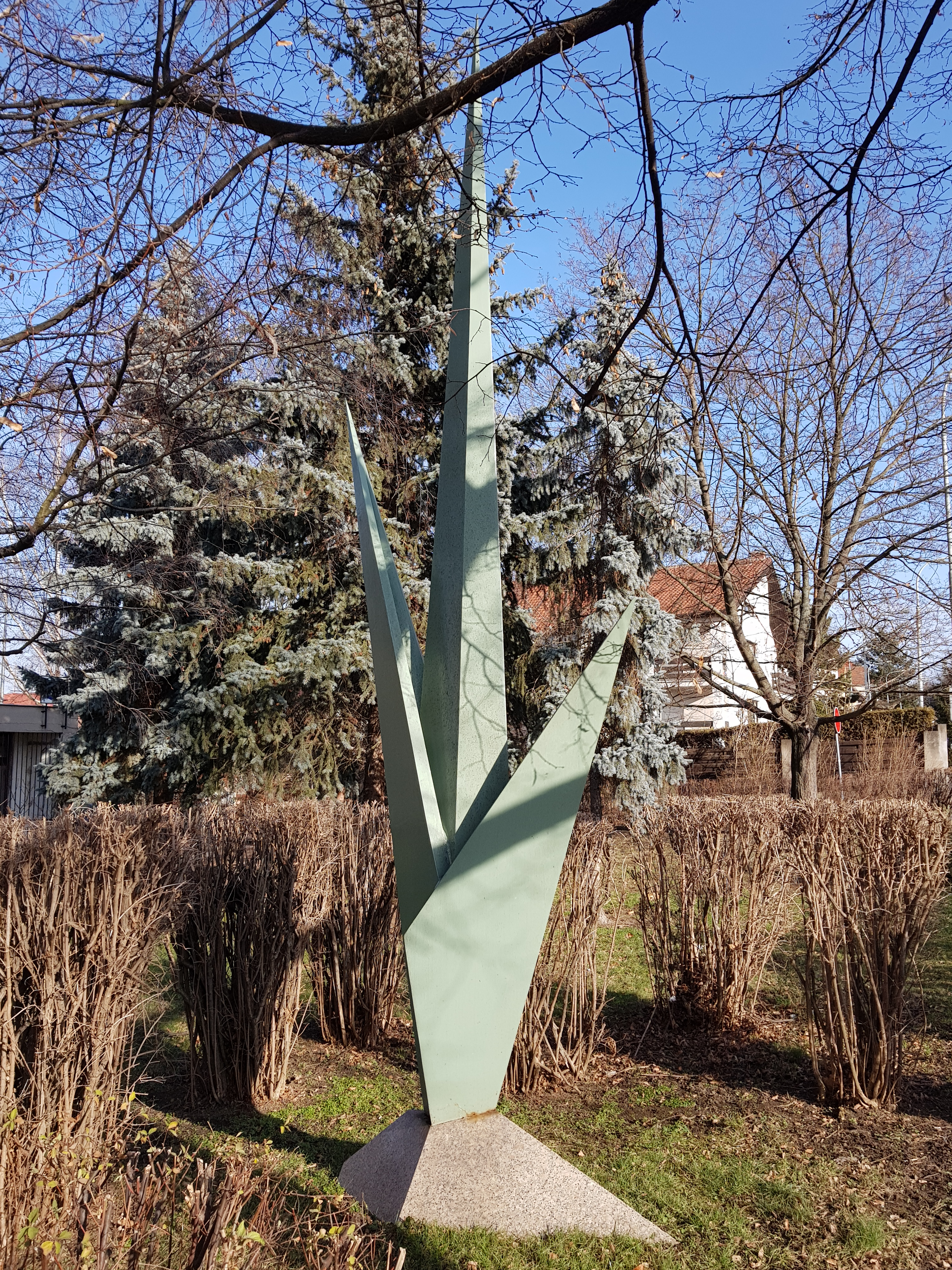 Plastika Stvol, ulice Šestajovická, Praha 14 - Hloubětín